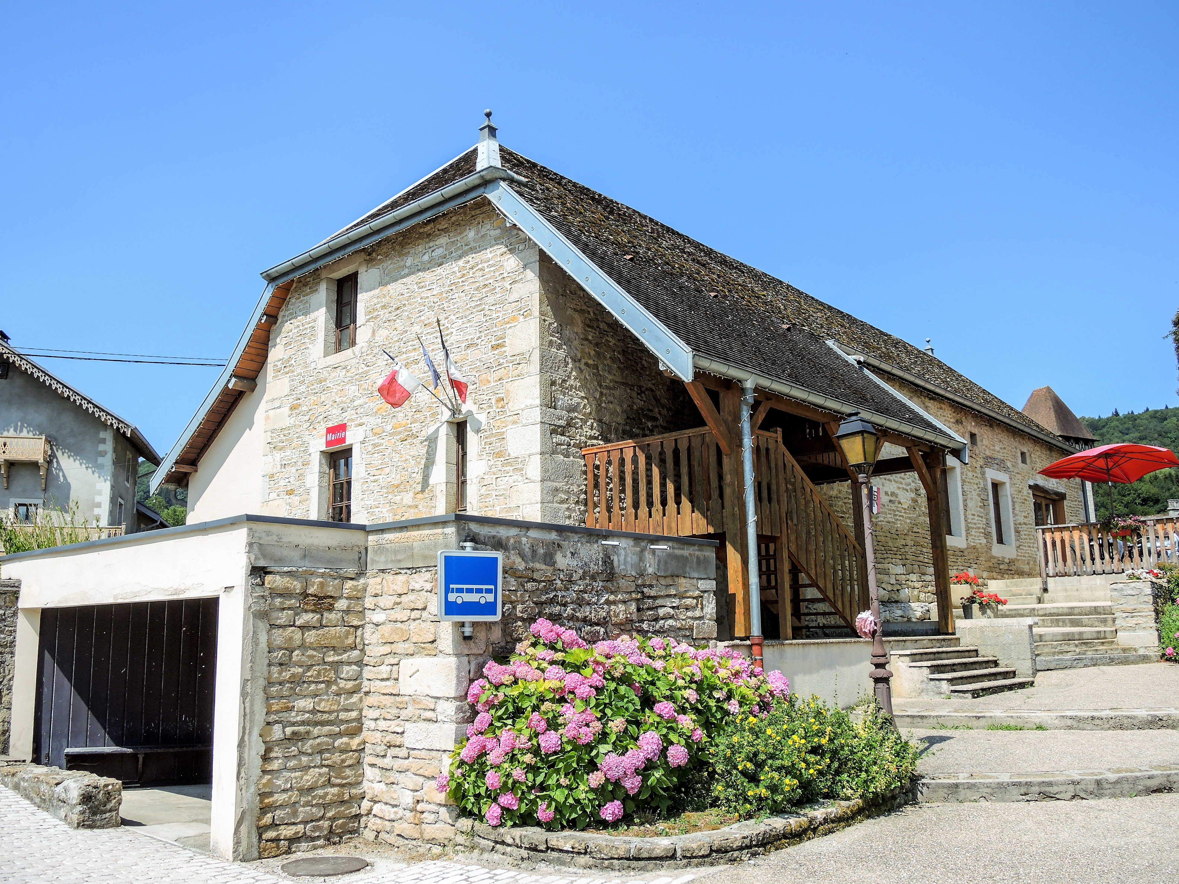 Mairie d'Epeugney. Doubs